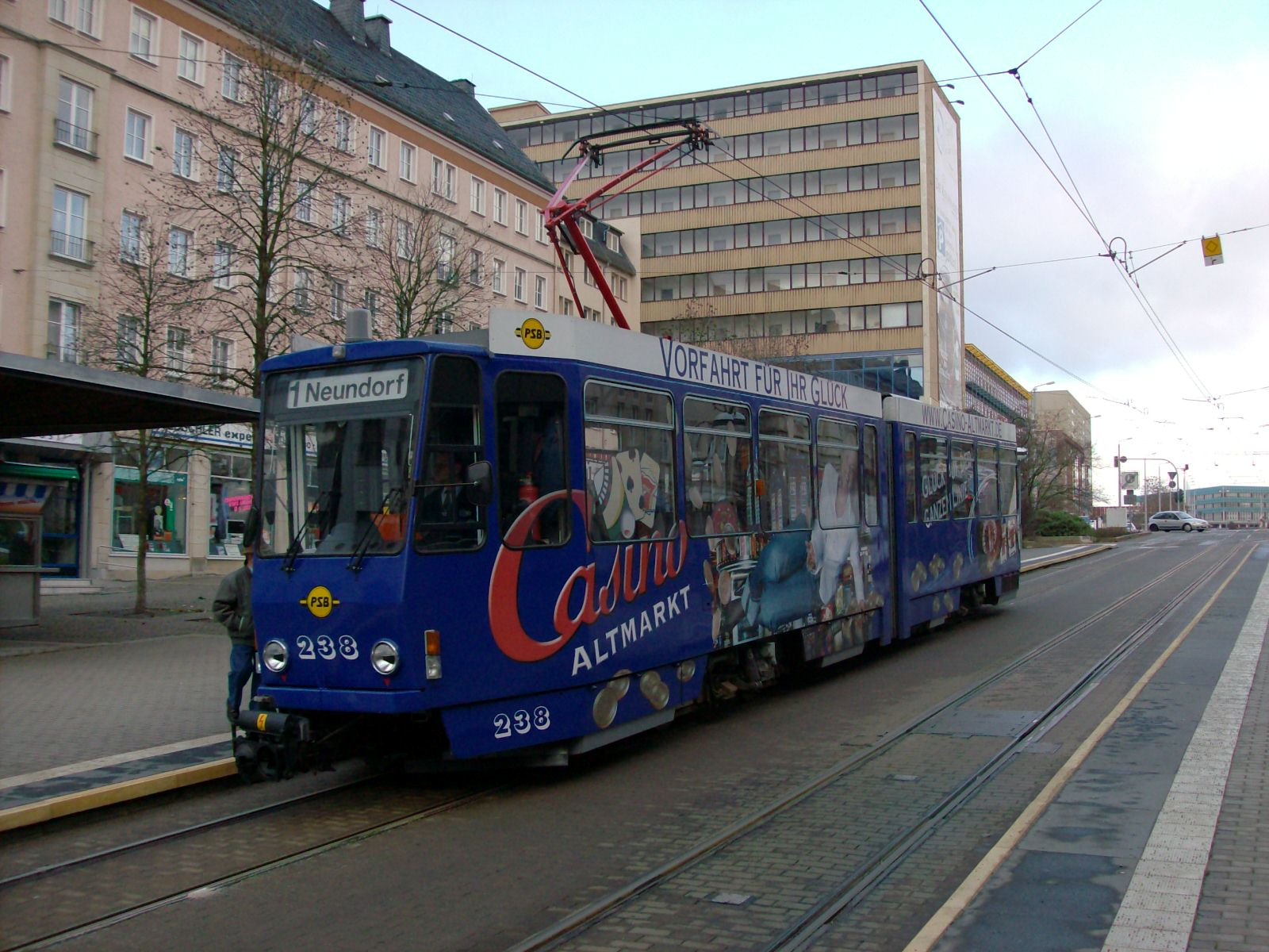 Tw 238 an der Haltestelle Am Albertplatz